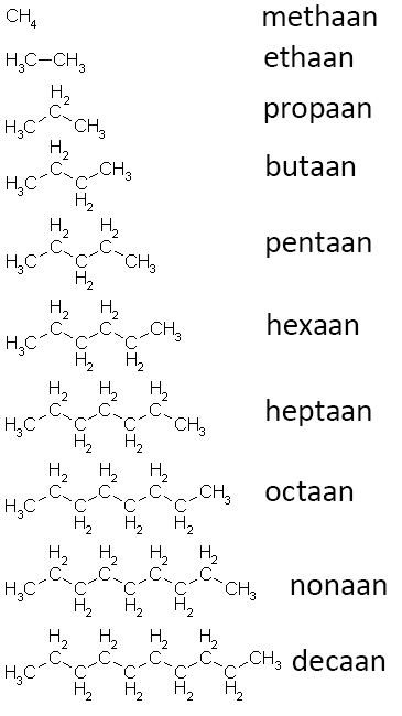 Deze afbeelding toont de alkanen methaan tot en met decaan. De afbeelding is door mezelf gemaakt met diverse programma's waaronder Paint Shop Pro. De afbeelding is geheel vrij van auteursrechten en mag dus door iedereen overal voor worden gebruikt zonder bronvermelding of wat dan ook.